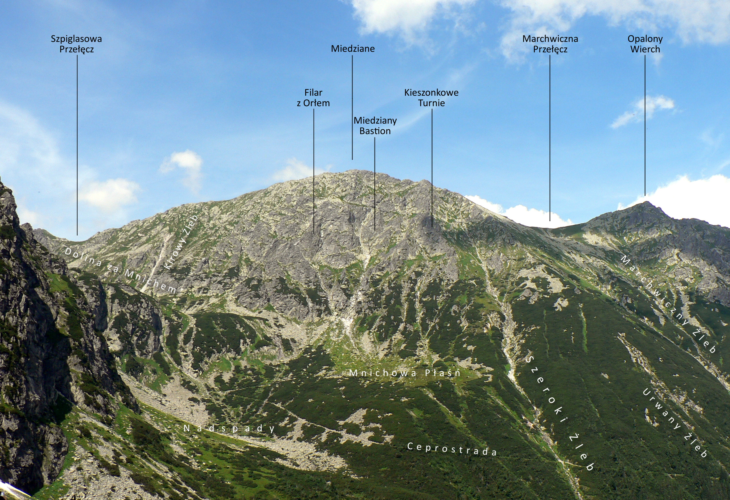 Szpiglasowa Przełęcz, Miedziane i Opalony Wierch znad Czarnego Stawu pod Rysami